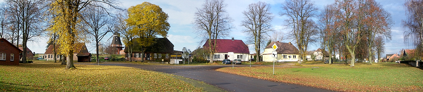 Dorfanger von Goldenbow